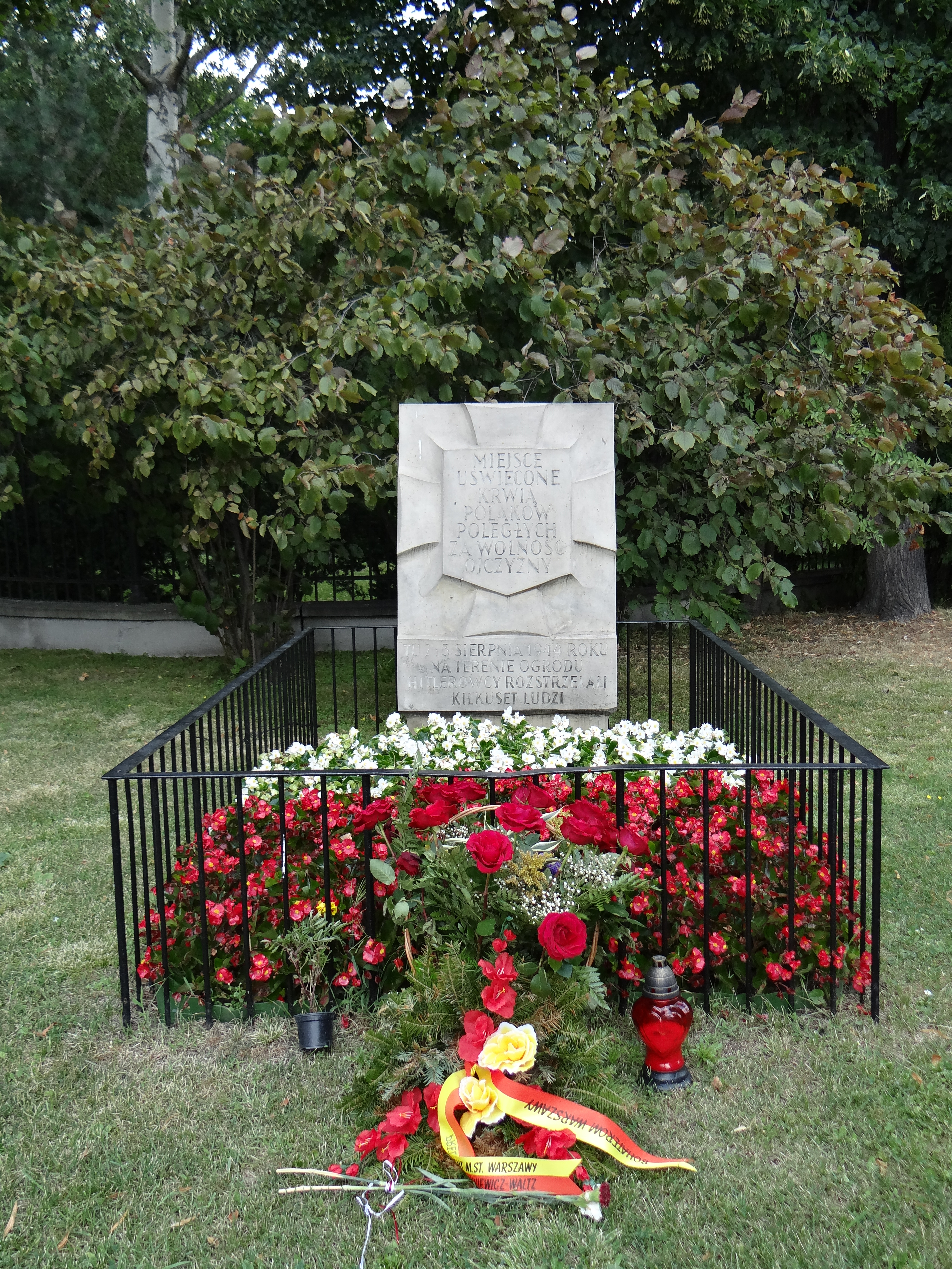 Aleje Ujazdowskie róg Bagateli - miejsce pamięci ku czci rozstrzelanych kilkuset osób w dniach 2 i 3 sierpnia 1944 r przez hitlerowskich oprawców